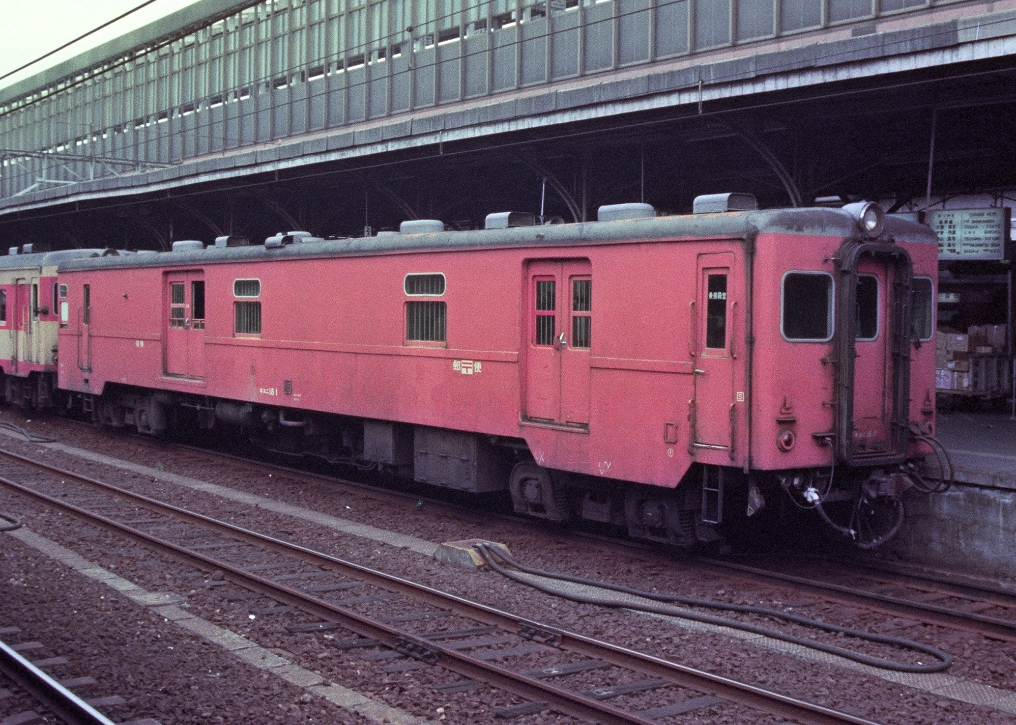 国鉄キユニ18 1